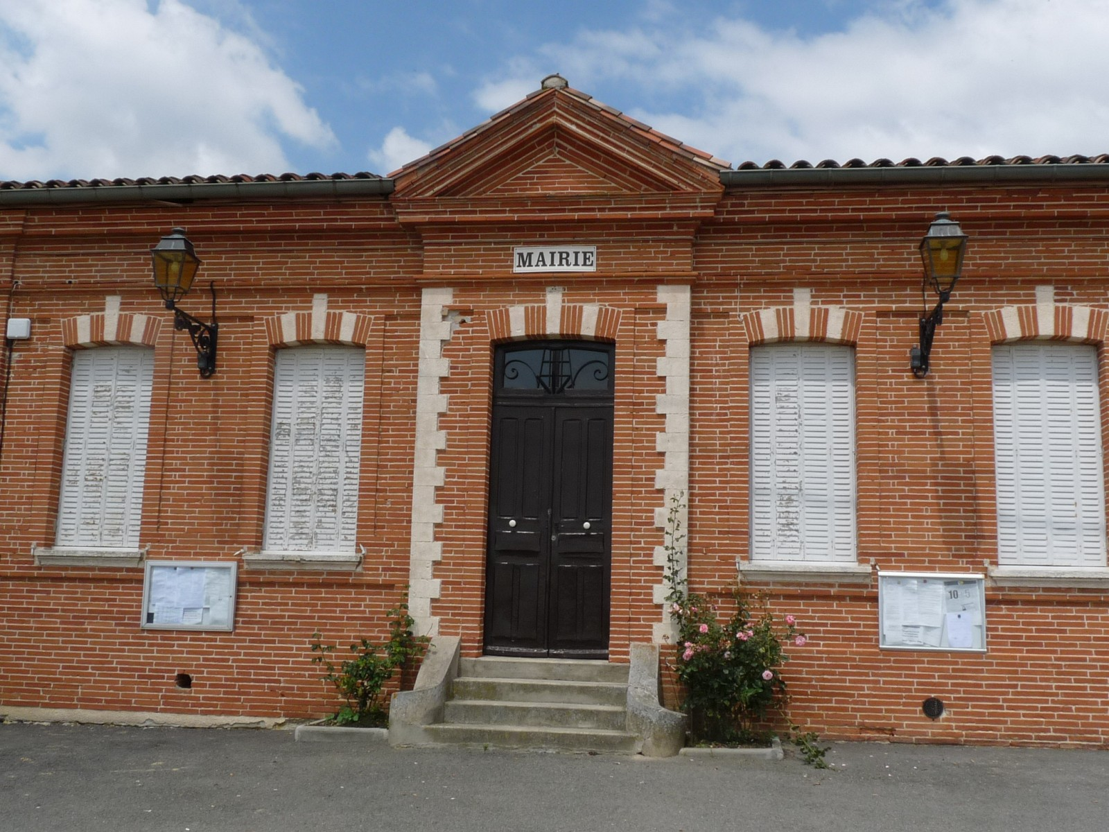 Mairie de Prunet, Haute-Garonne, France